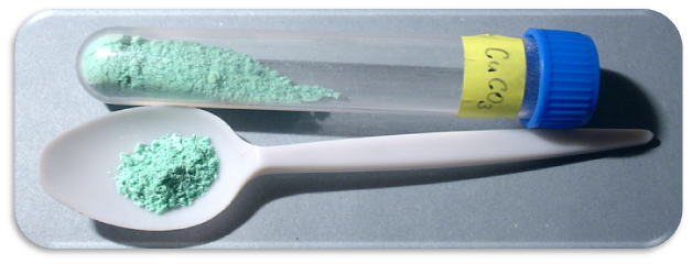 Uhličitan měďnatý - CuCO3